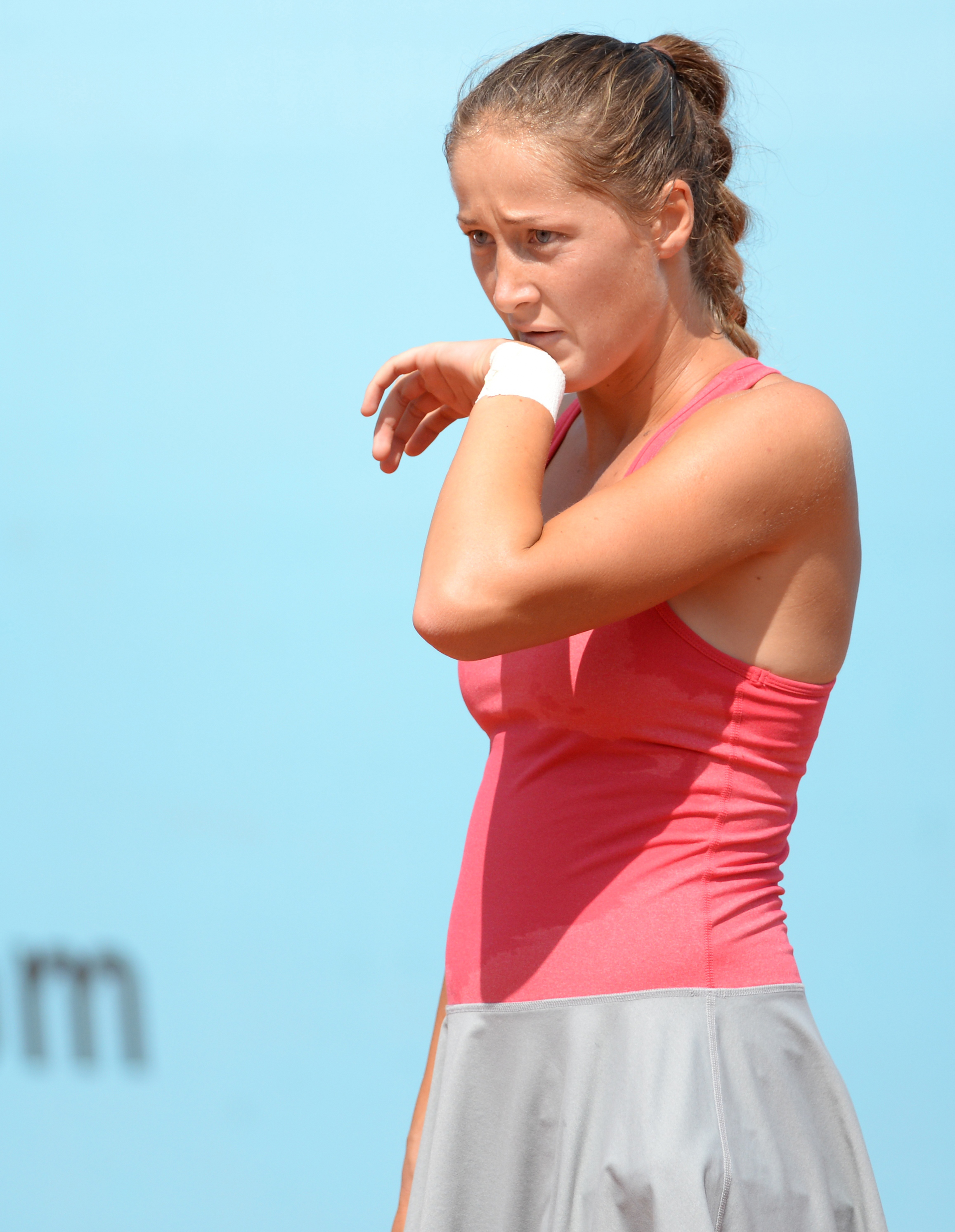 Bojana Jovanovski